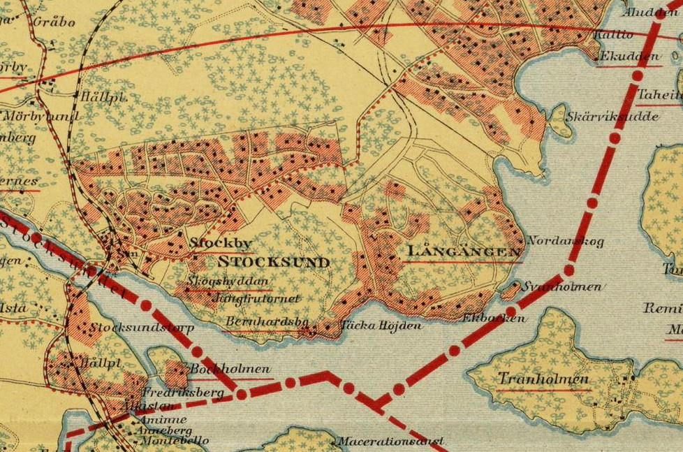 Del av 1917 års karta över Stockholm med omgivningar med Stocksund och Långängen